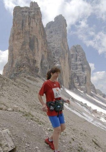 gara di ultra trail tre cime di lavaredo